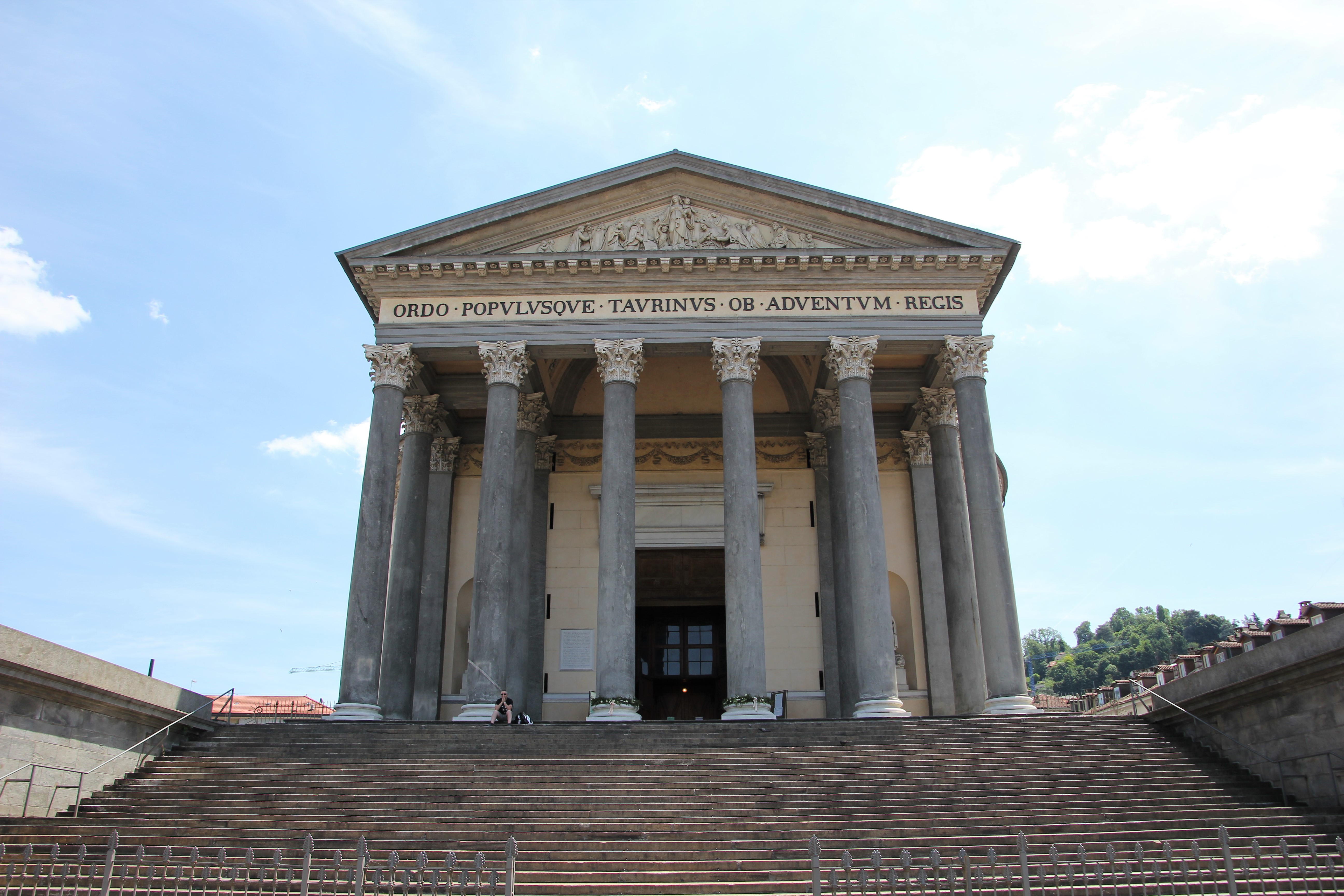 Torino, chiesa della Gran Madre di Dio